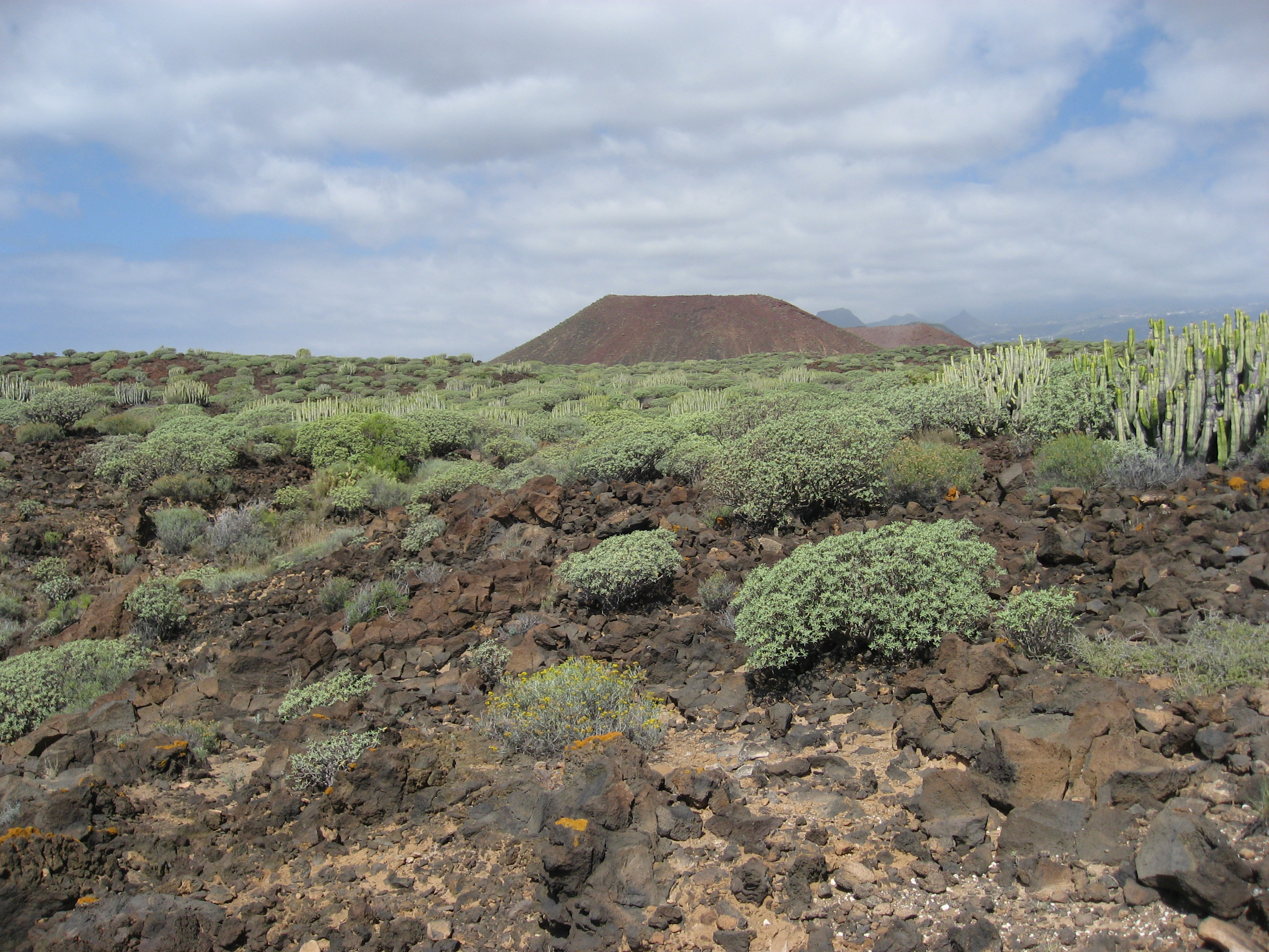 Montaña Grande. Malpaís de Rasca, Tenerife.